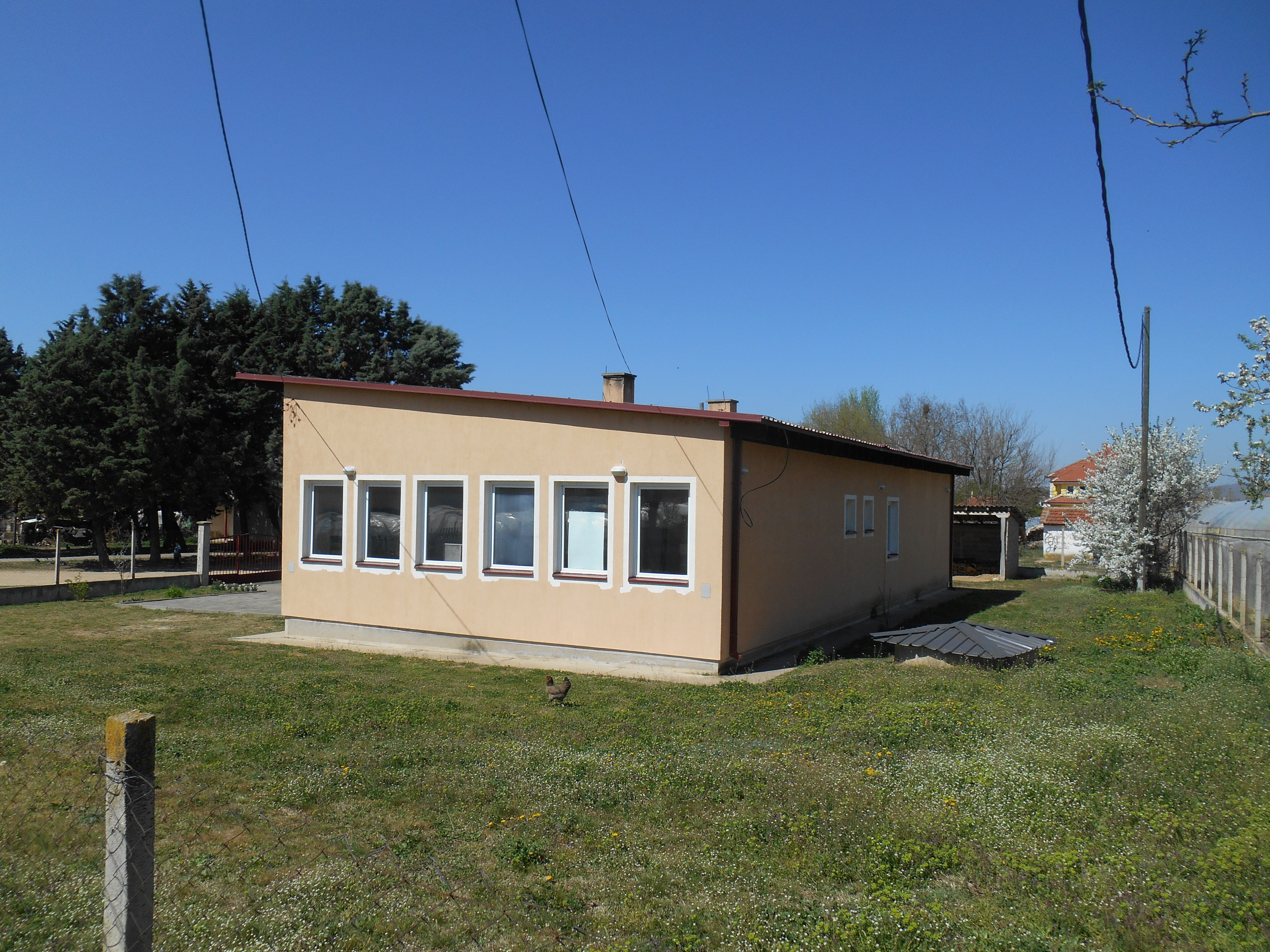 Основно училиште „Гоце Делчев“ - Гечерлија